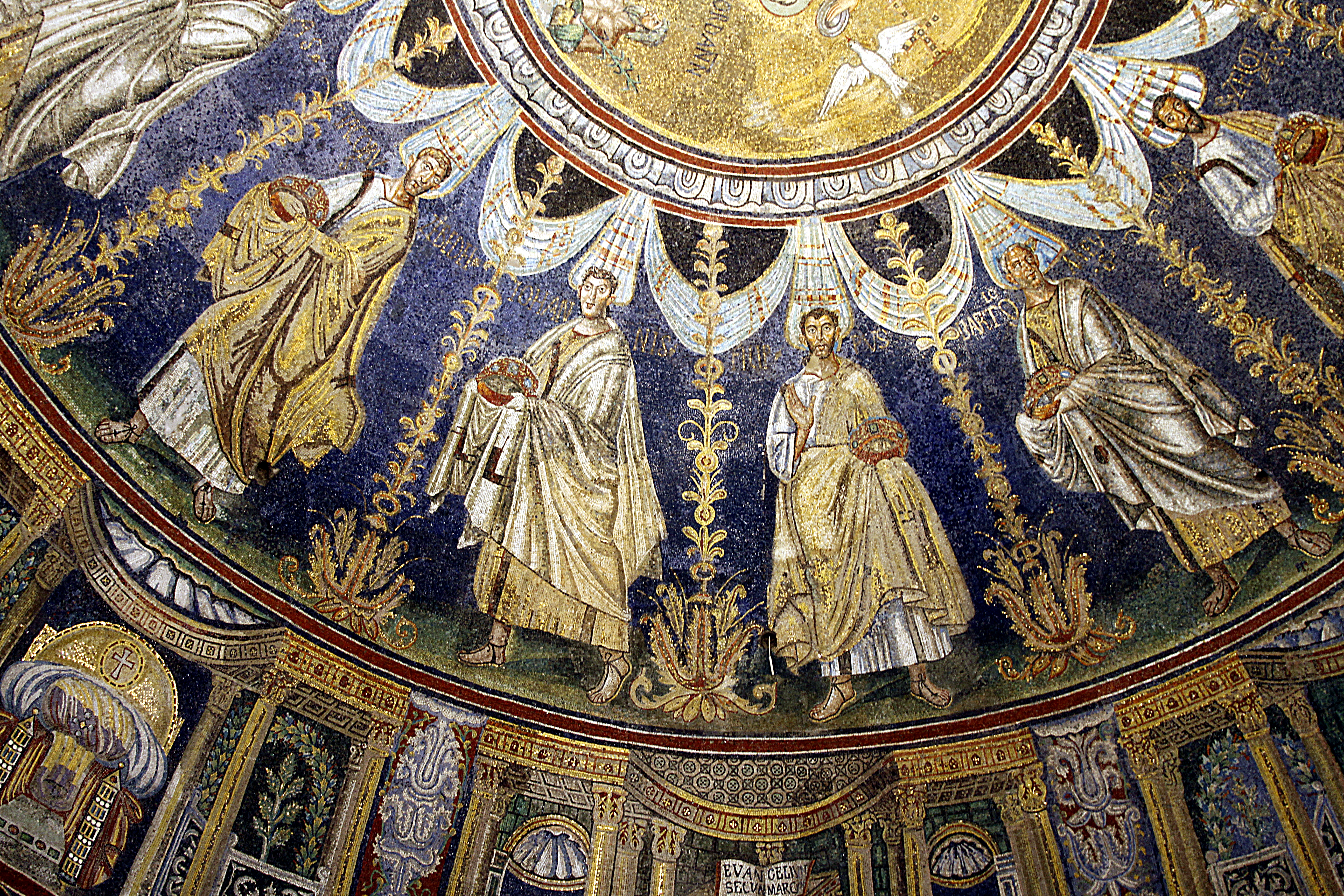 Baptistry of Neon (Ravenna) - Mosaics